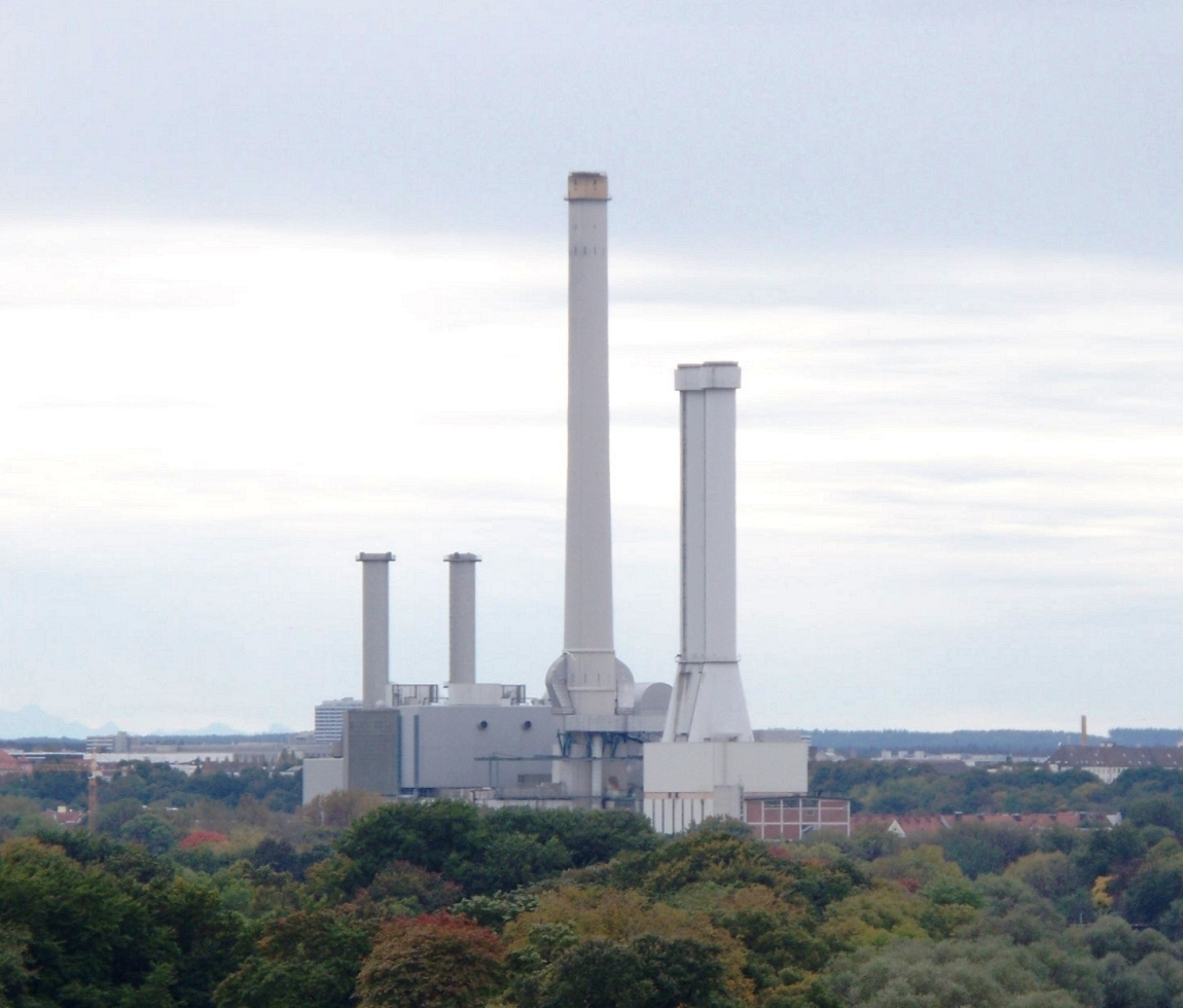 Das Heizkraftwerk München Süd.